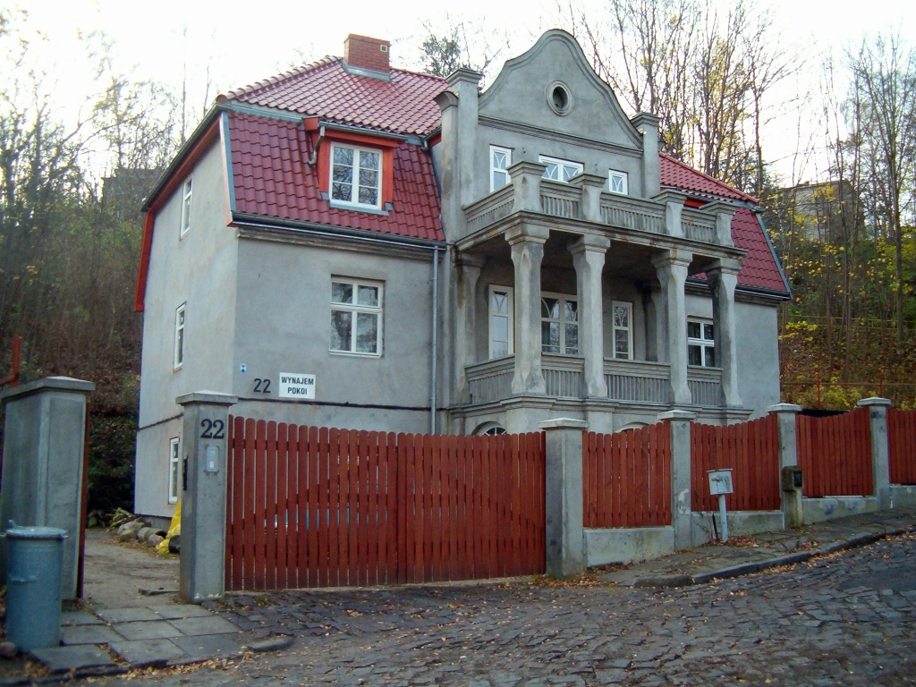 Gdynia, ul. Sędzickiego 22 - Willa "Zosieńka", 1923